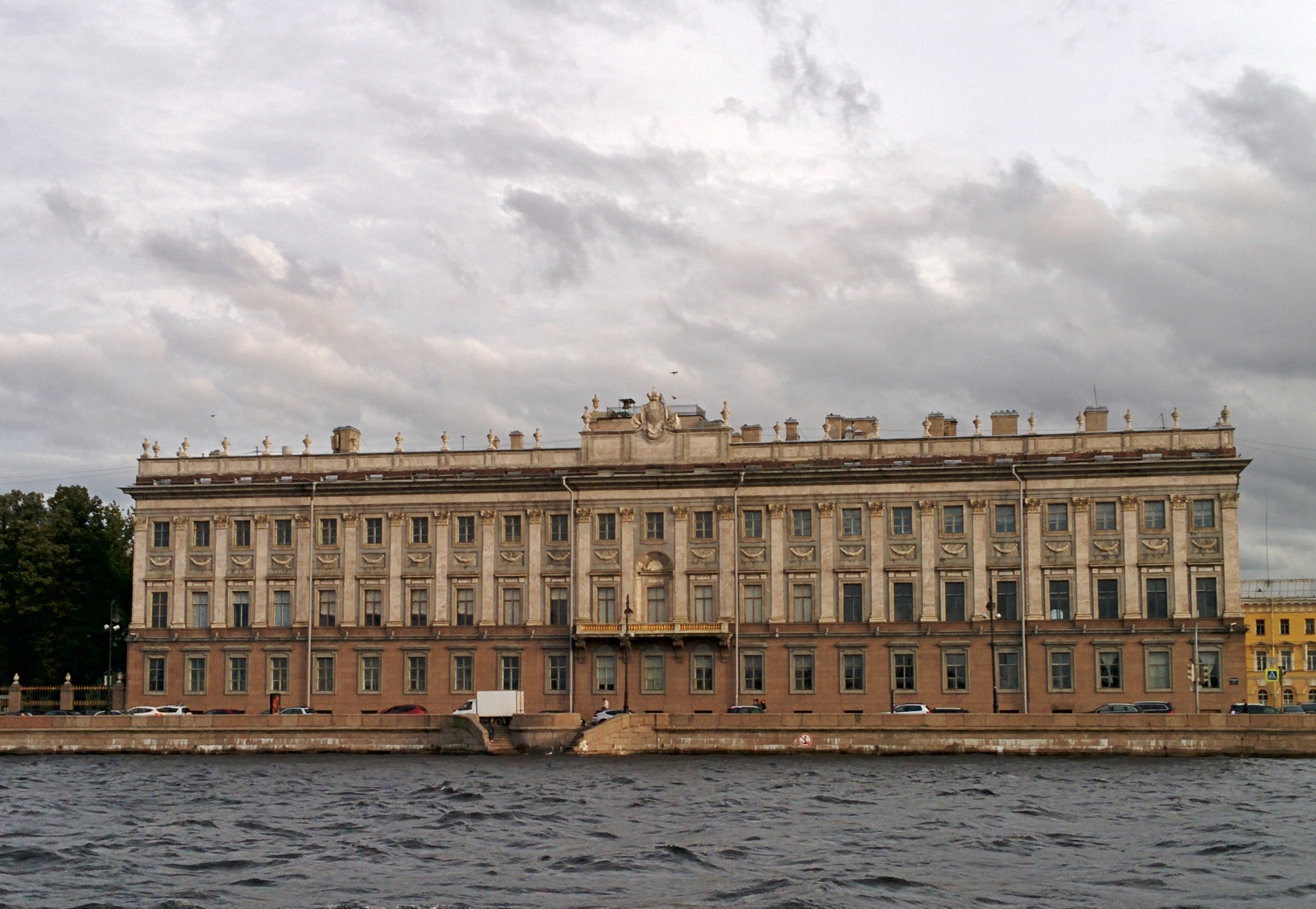 Ансамбль Мраморного дворца: Миллионная улица, 5, Дворцовая набережная, 6, Мраморный переулок, Суворовская площадь, Центральный район, Санкт-Петербург